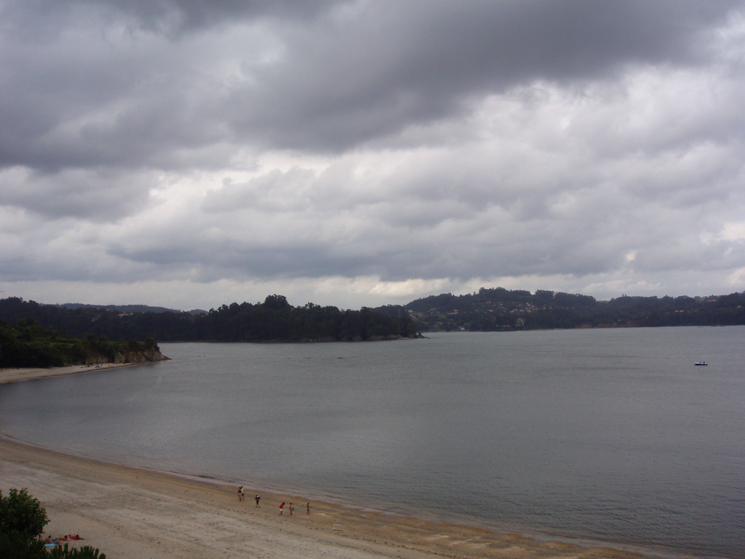 Playa de Sumiño, MiñoPlaya de Sumiño, Miño